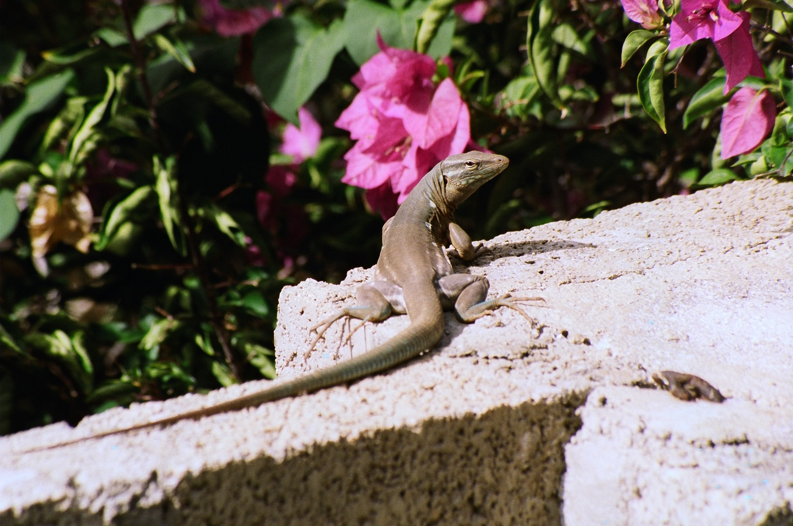 Hagedis in Christoffelpark op Curacao